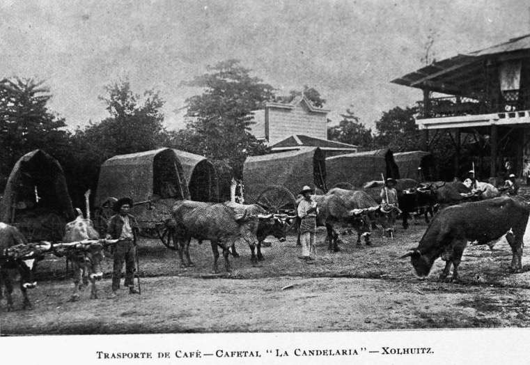 Transporte de café en el Cafetal La Candelaria en Guatemala. 1897.